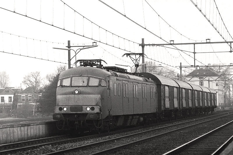 mP met H-posten,Ac.